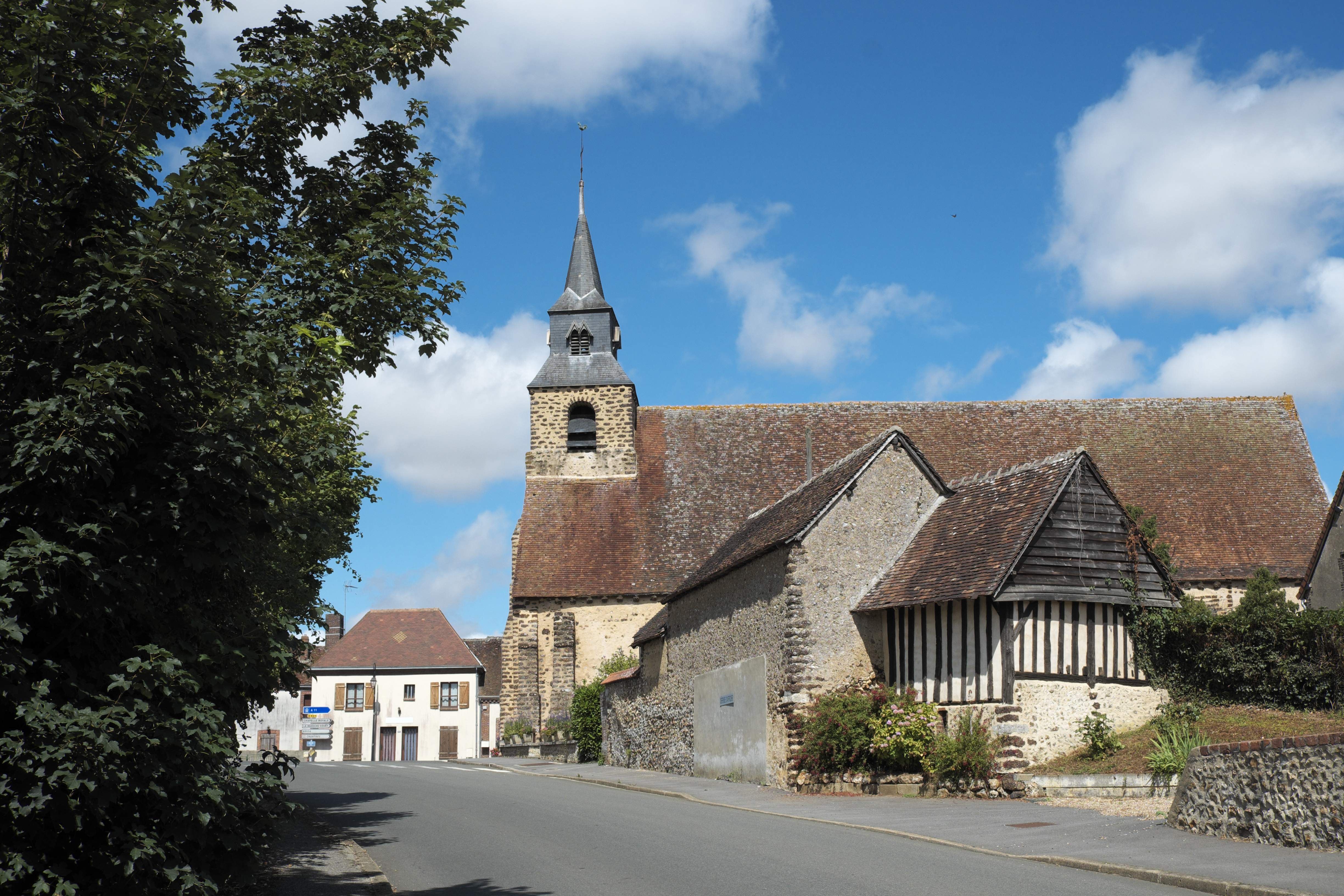 Katholische Kirche Sainte-Anne in Le Gault-du-Perche im Département Loir-et-Cher (Centre-Val de Loire/Frankreich)